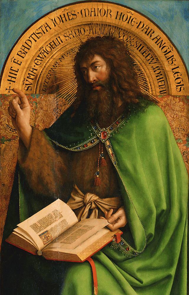 retable de l'Agneau mystique detail